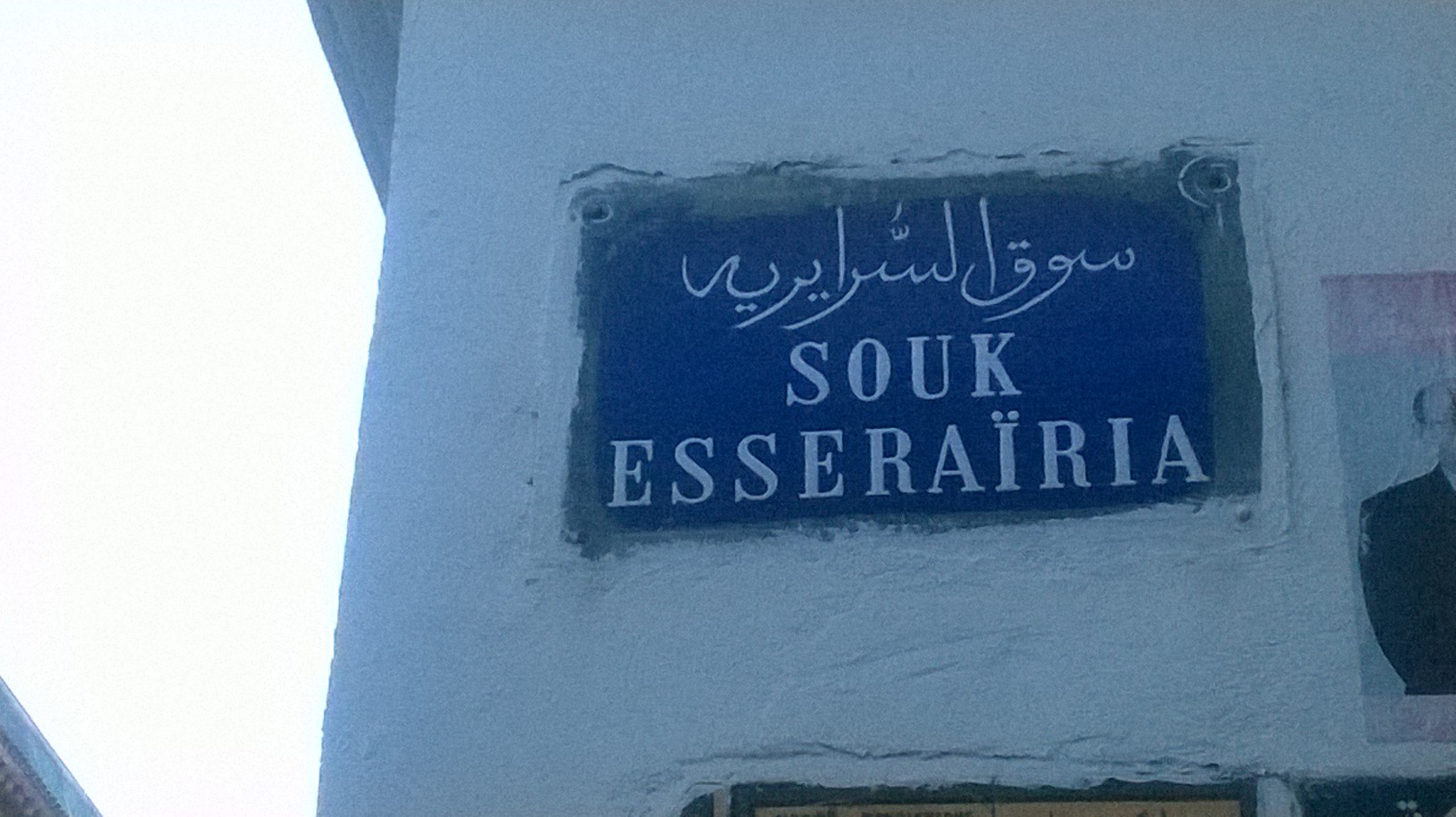 la médina de Tunis